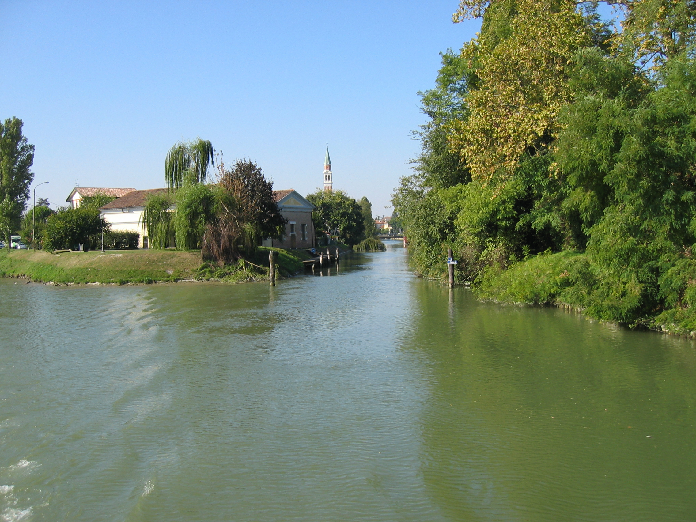 Brentakanaal bij Mira. Eigen foto.